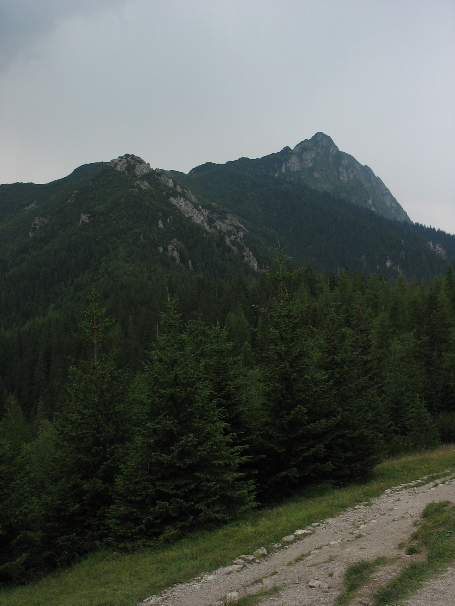 Przełęcz Białego, Giewont, Tatry, Tatry Zachodnie